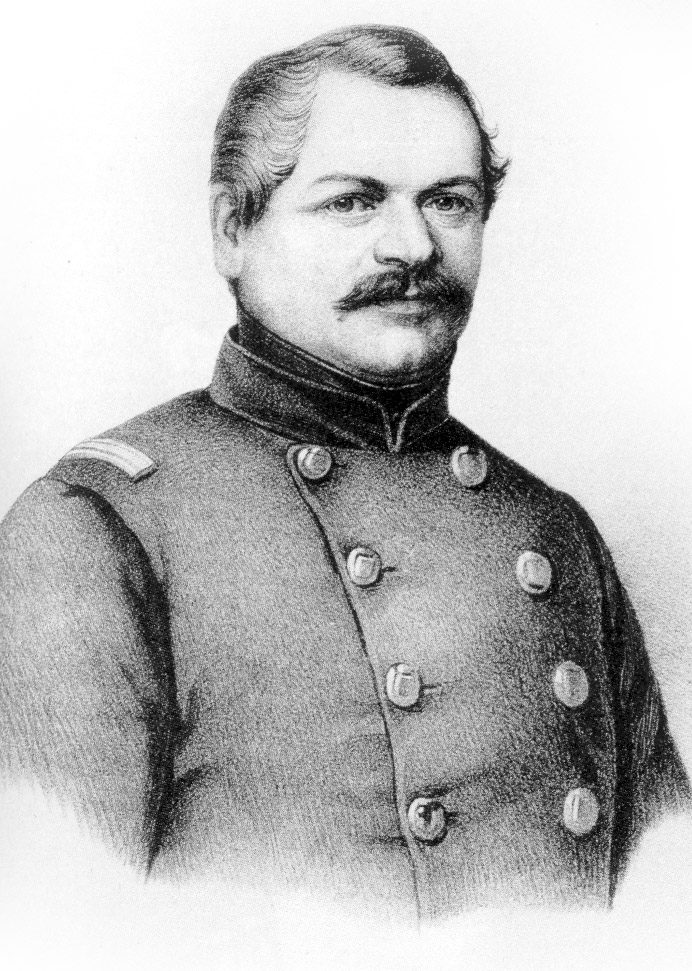 Heinrich Christian Burckhardt (1811-1879), German forester (forestry scientist) / deutscher Forstmann (Forstwissenschaftler)